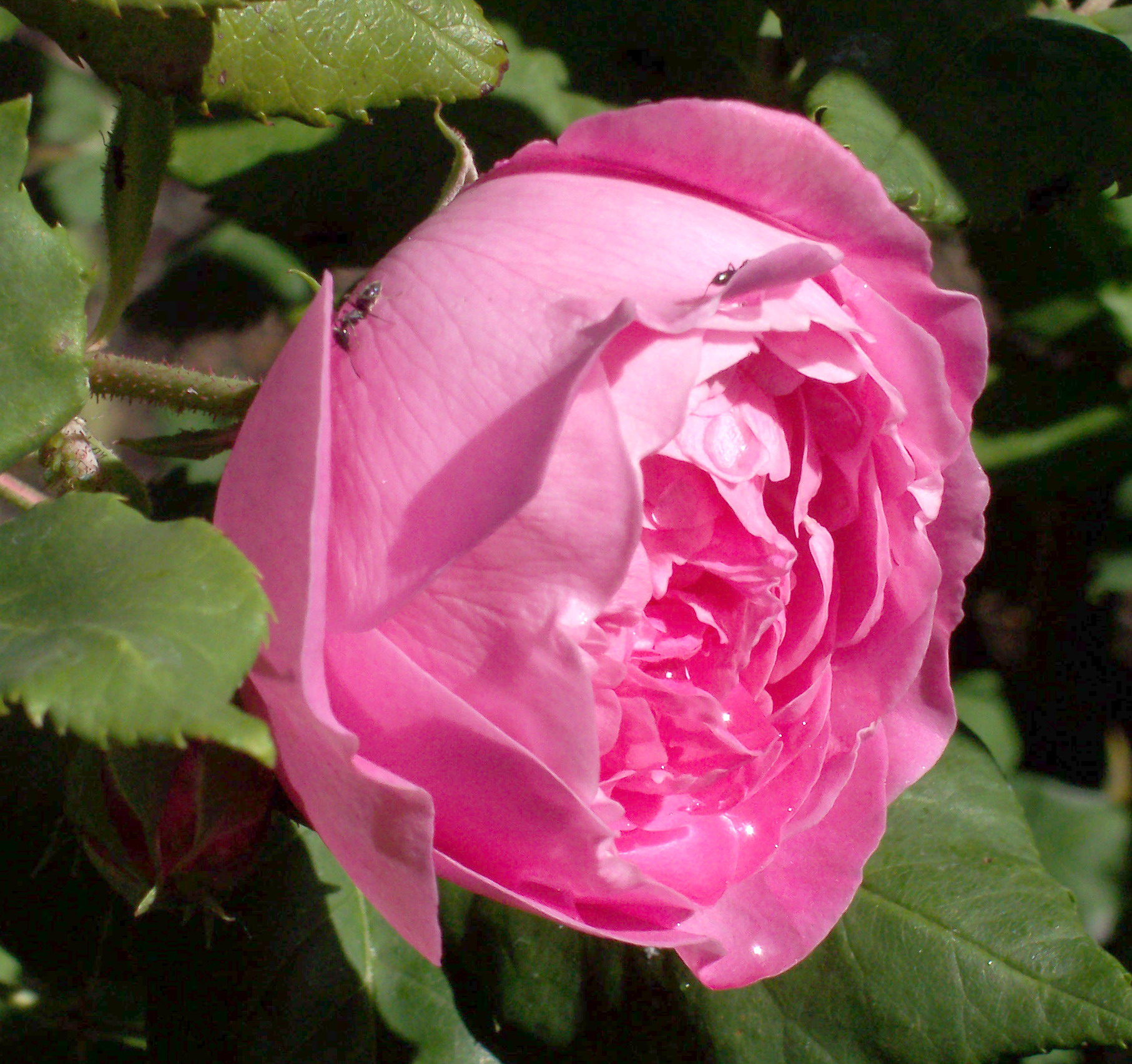 Rosa 'Mme Pierre Oger', gr. Borbonianas, sect. Chinensis. Real Jardín Botánico, Madrid